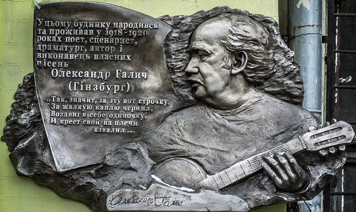 Мемориальная доска Александра Галича (Гинзбурга), Украина, г. Днепр, ул. Старокозацкая (бывш. Комсомольская), 74. Установлена в 2016 году.